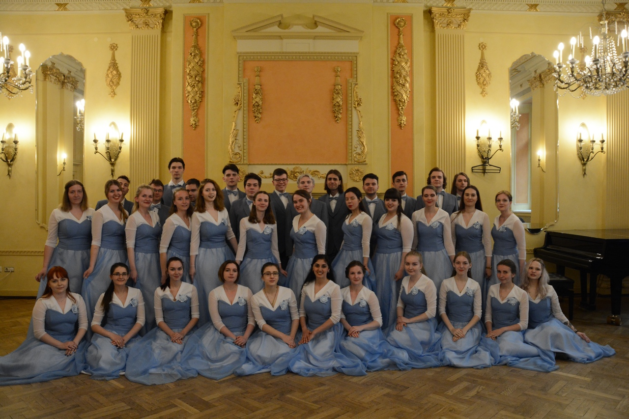 Хор НГЛУ в Рижском латышском обществе